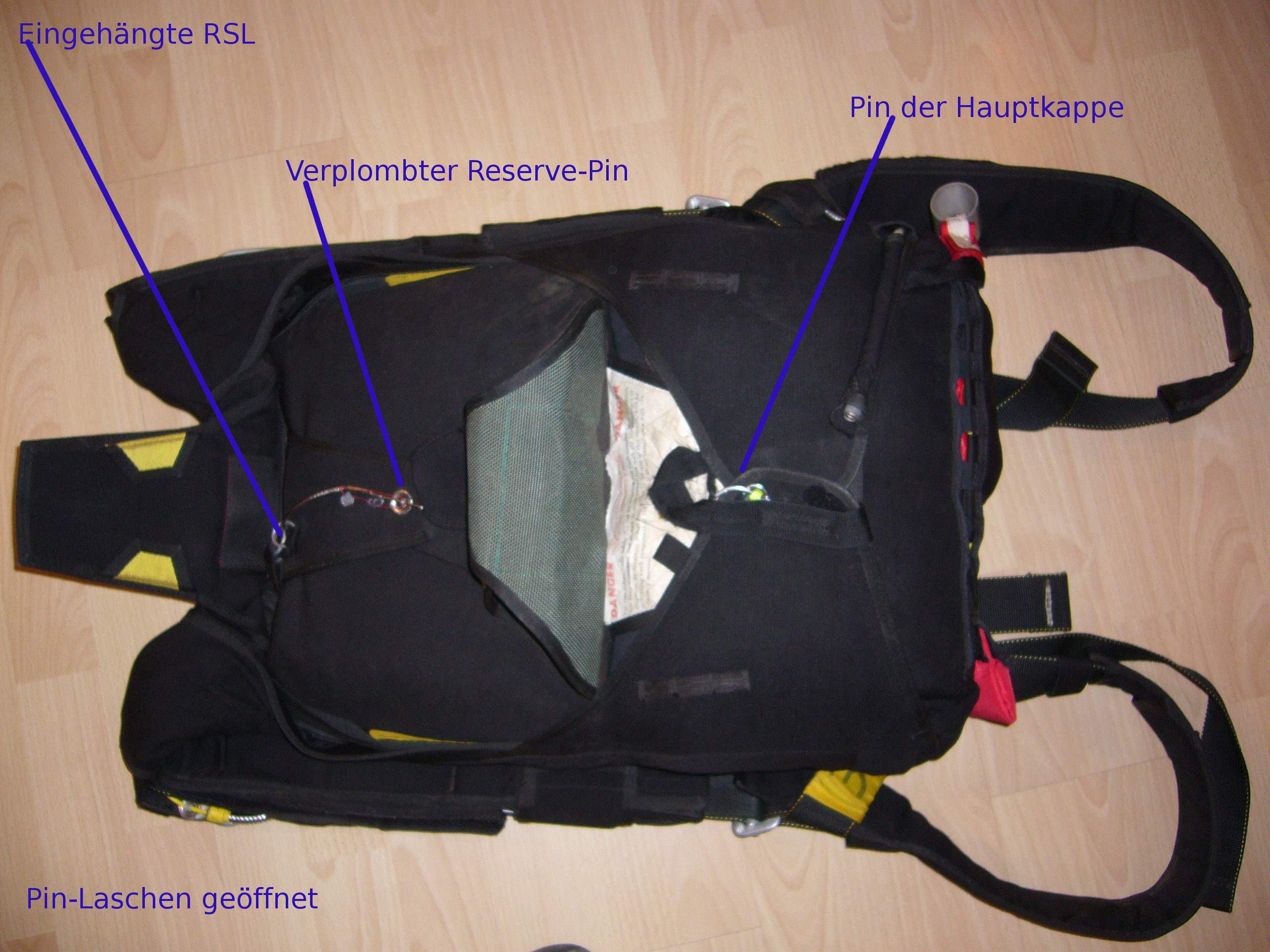 Fallschirm Rig Schülerfallschirm mit Erklärungen und Beschreibungen